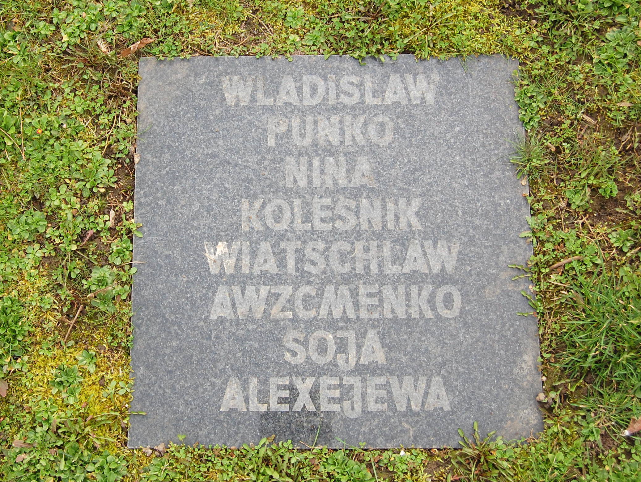 Einer der Grabsteine auf dem Feld der Vereinten Nationen in Westerhüsen